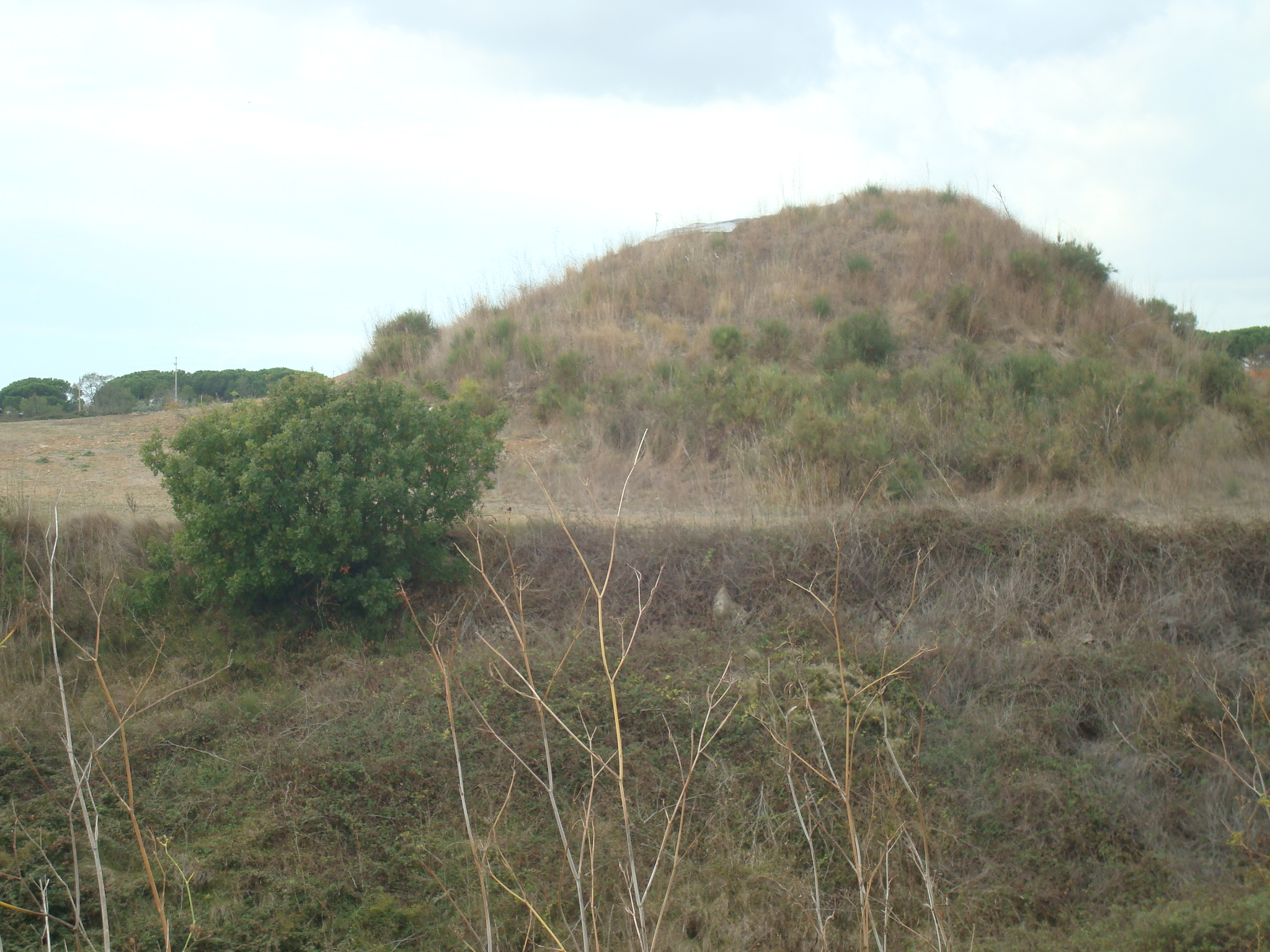 Museo archeologico nazionale tarquiniense - MIBAC . This is a photo of a monument which is part of cultural heritage of Italy.